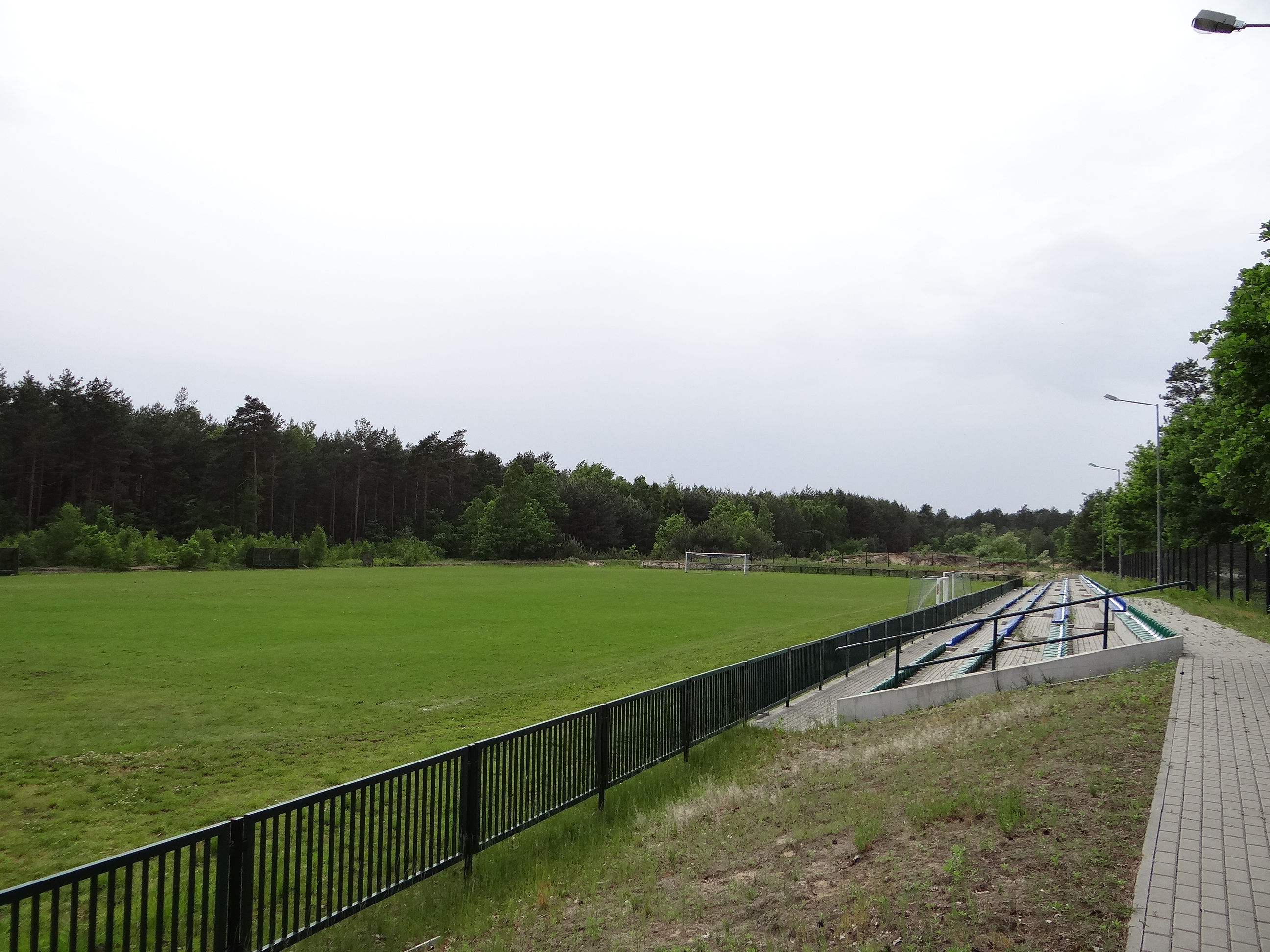 Zdjęcie wykonane w miejscowości Sól, gmina Biłgoraj.